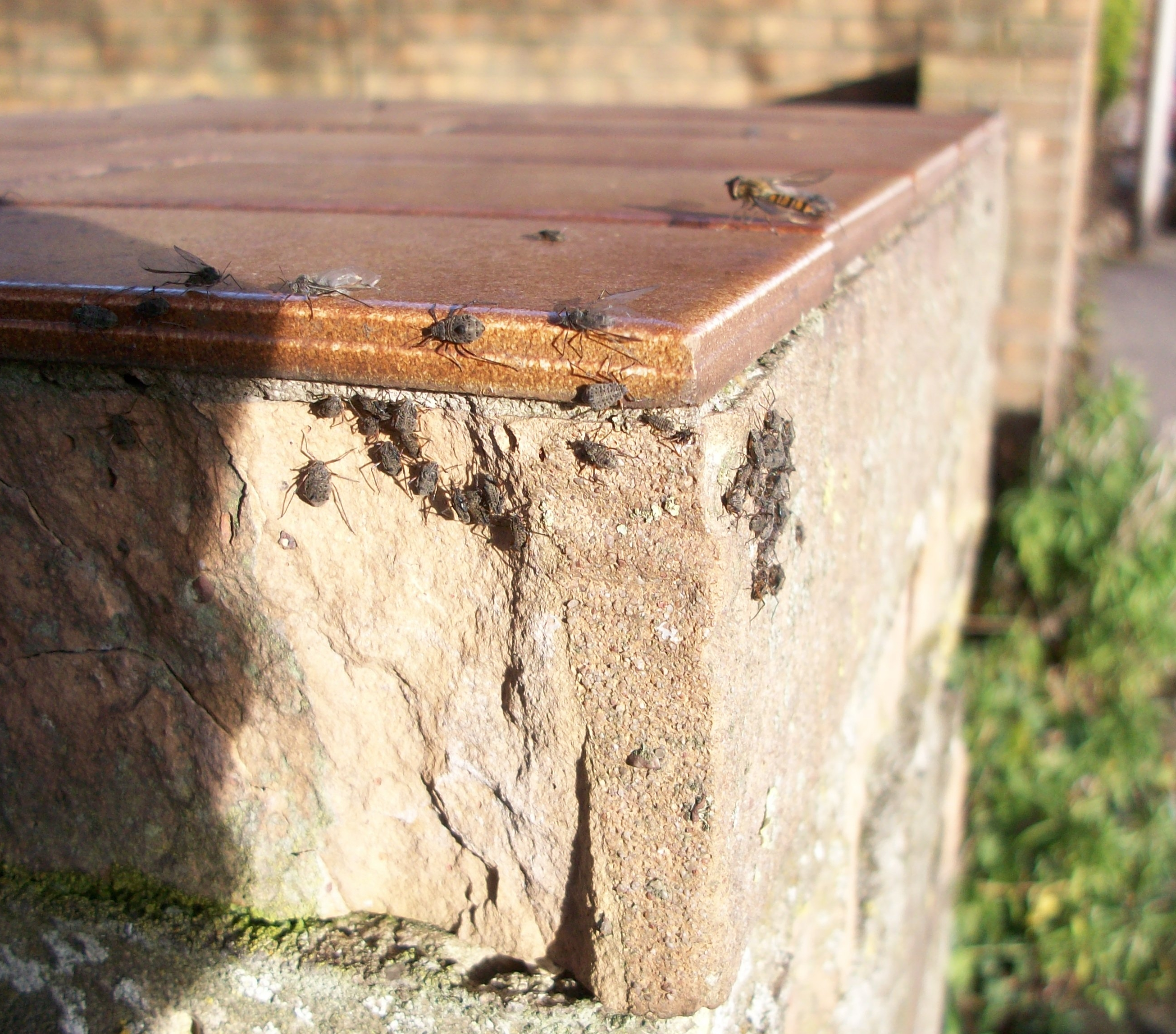 photo prise le 23 decembre 2018 , lieu ; 59210 France des Tuberolachnus salignus se réchauffent sur une brique au soleil sous un saule pleureur